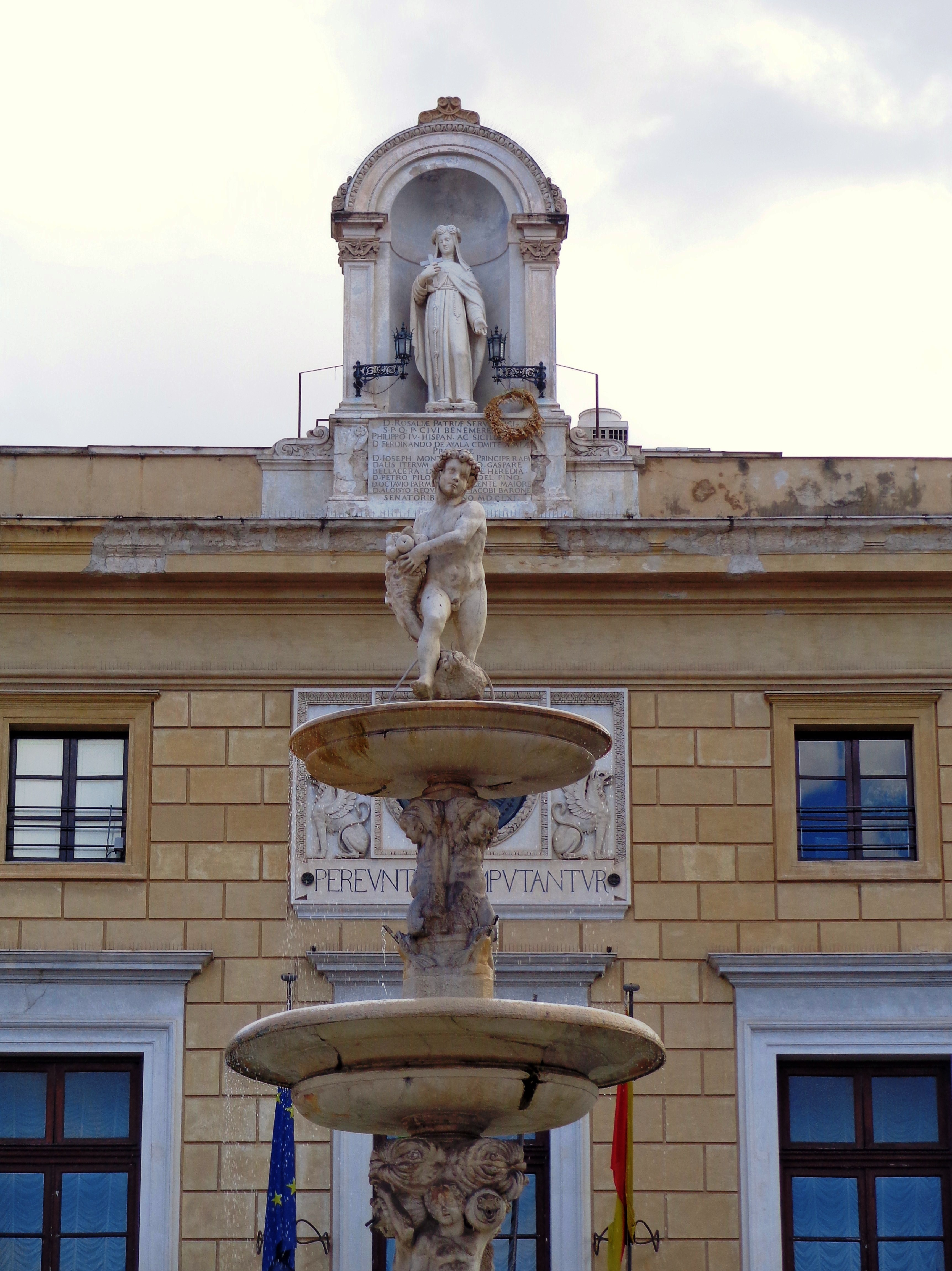 Fontana Pretoria This is a photo of a monument which is part of cultural heritage of Italy.